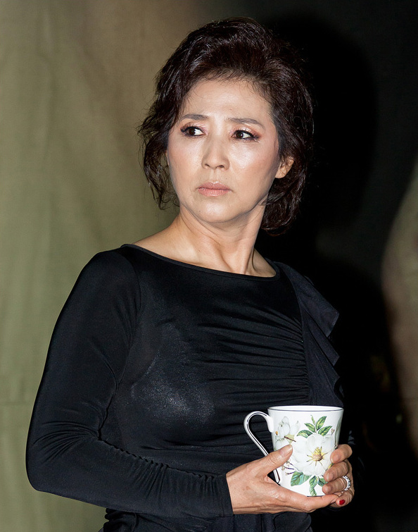 연극 댄스레슨을 연습 중인 고두심